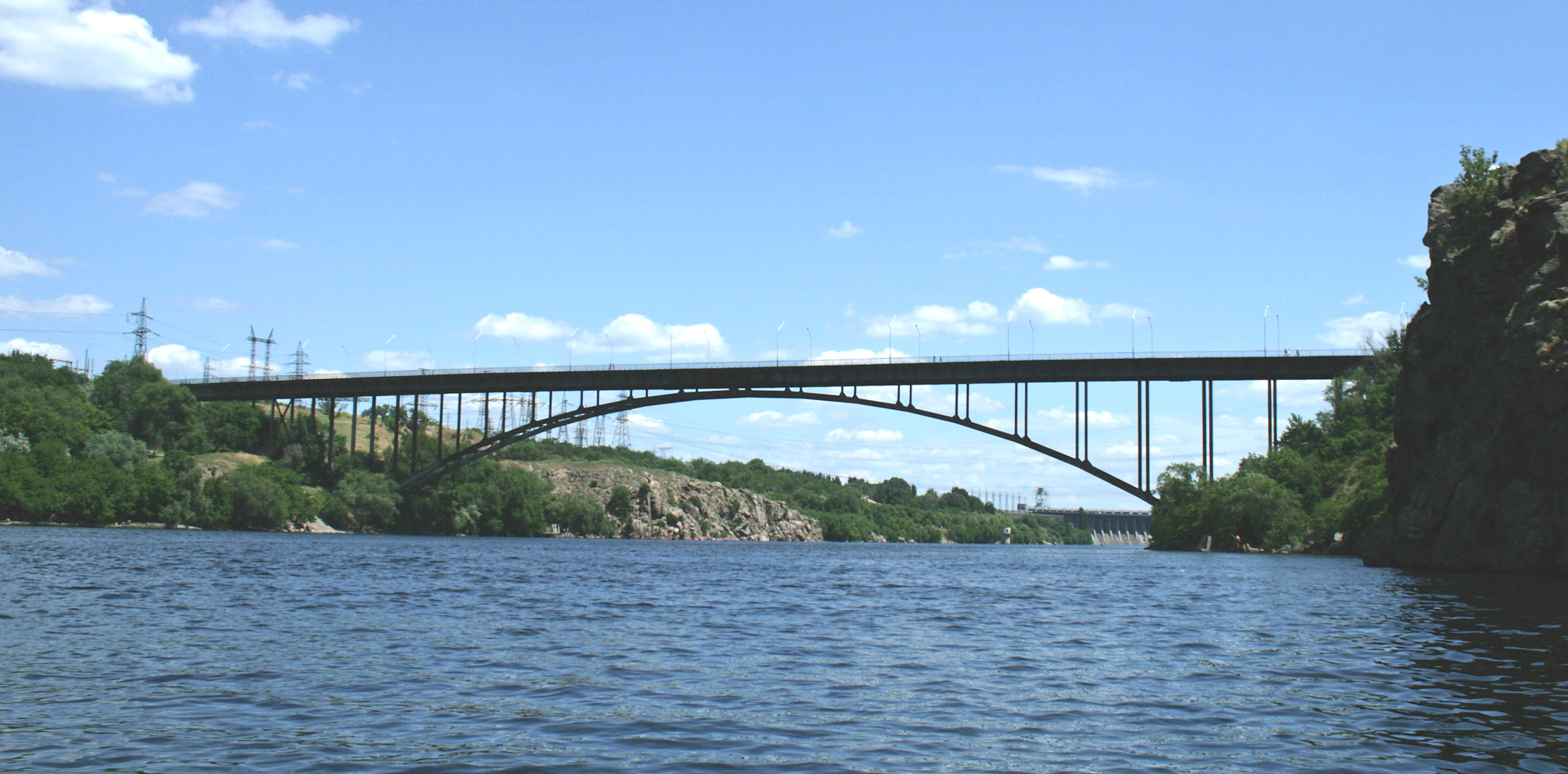 Автомобильный арочный металлический мост через Старый Днепр в городе Запорожье.